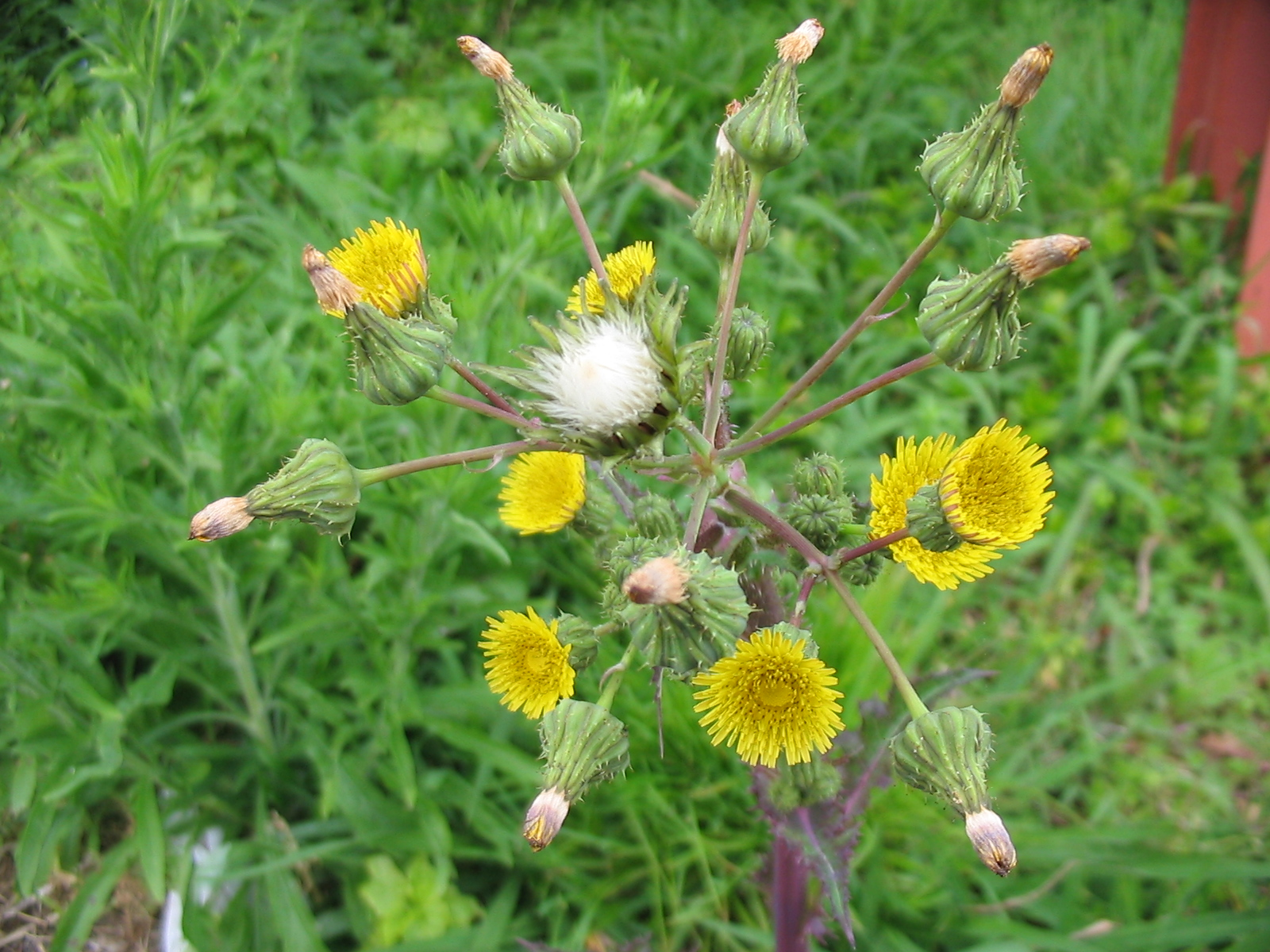 Gemüse-Gänsedistel (Sonchus oleraceus) - Blütenstand